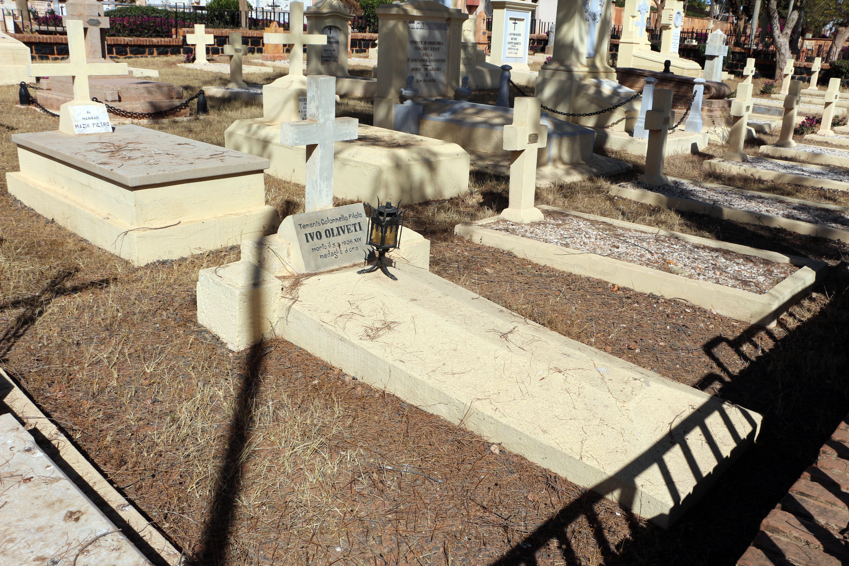 Cimitero italiano di asmara, tombe militari 10 ivo oliveti.JPG